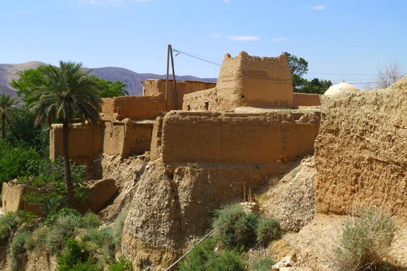 Maison traditionnelle du village rouge, El Kantara, Algeria.